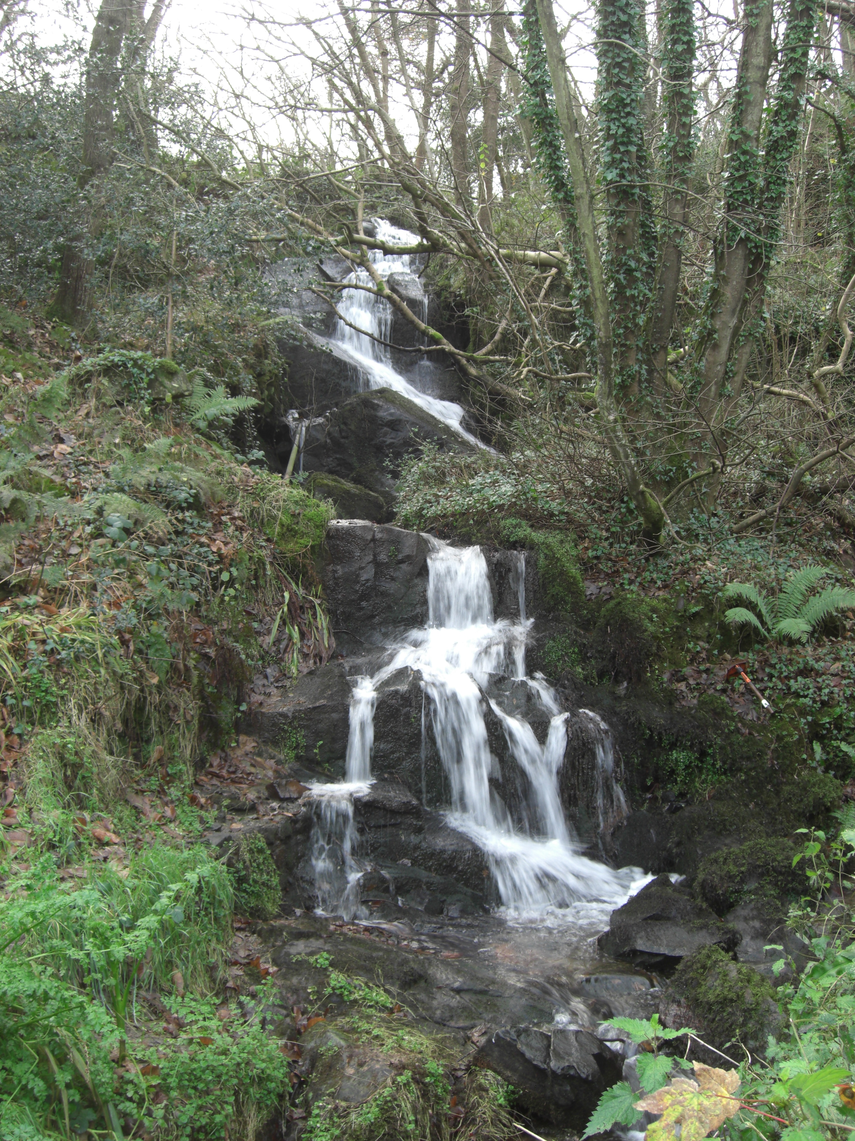 Cascade issue du ru nommé Sainte Hélène. La cascade alimente en eau le hameau la Brasserie.